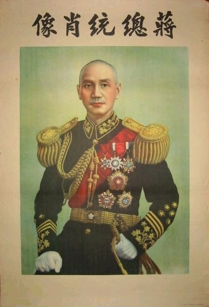 1948年5月20日蒋介石就任中华民国行宪总统后，著特级上将大礼服上色照。这是在1943年照片的基础上修改而成。肩章和袖口标志与前面照片相比，发生了明显变化：肩章为“青天白日”国徽、海军双锚、5颗5角星；袖口不再是3环加3朵金梅花，而是5朵金梅花。